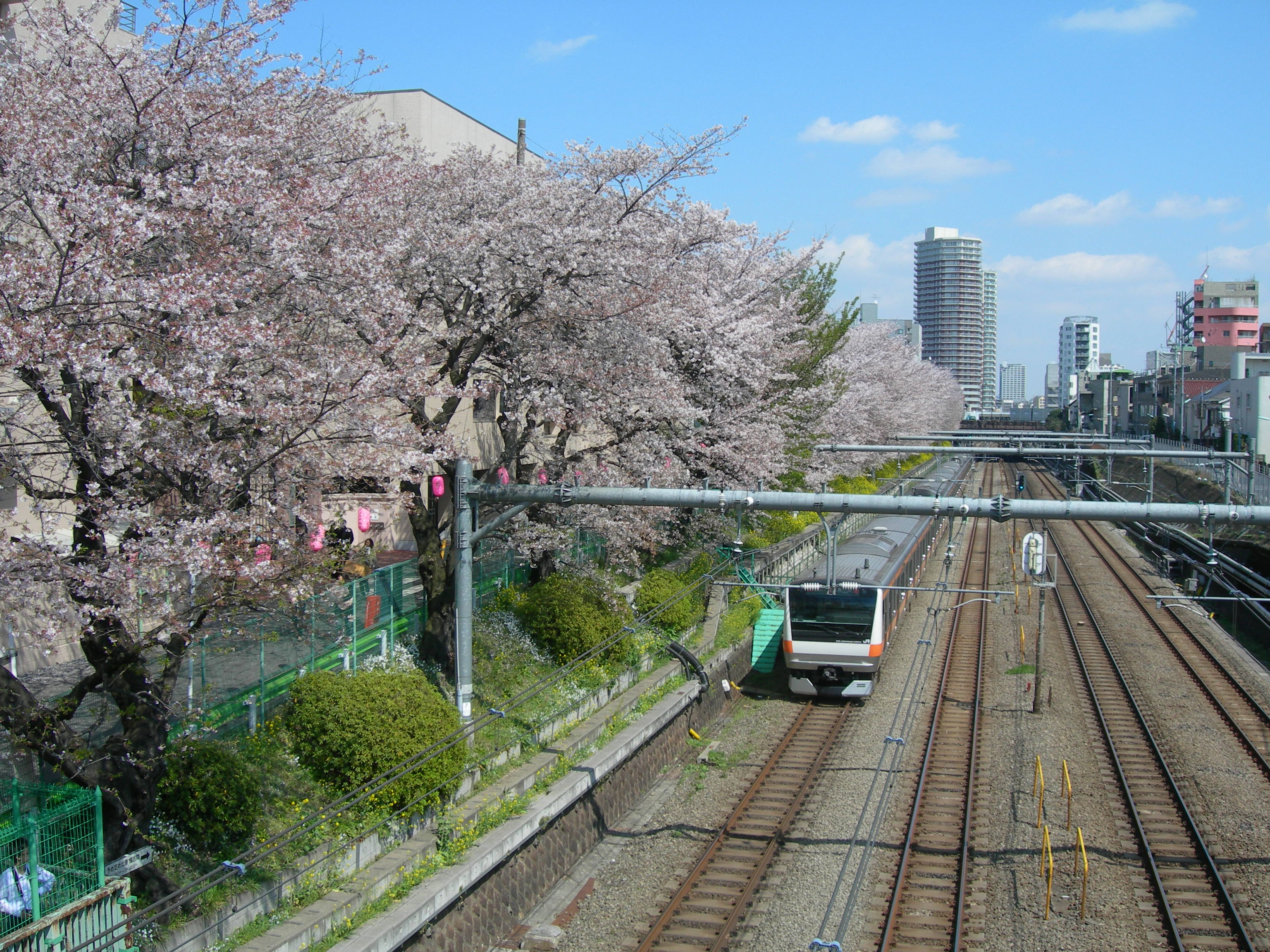 中央線東中野駅西方の桜並木 「中央線と桜」